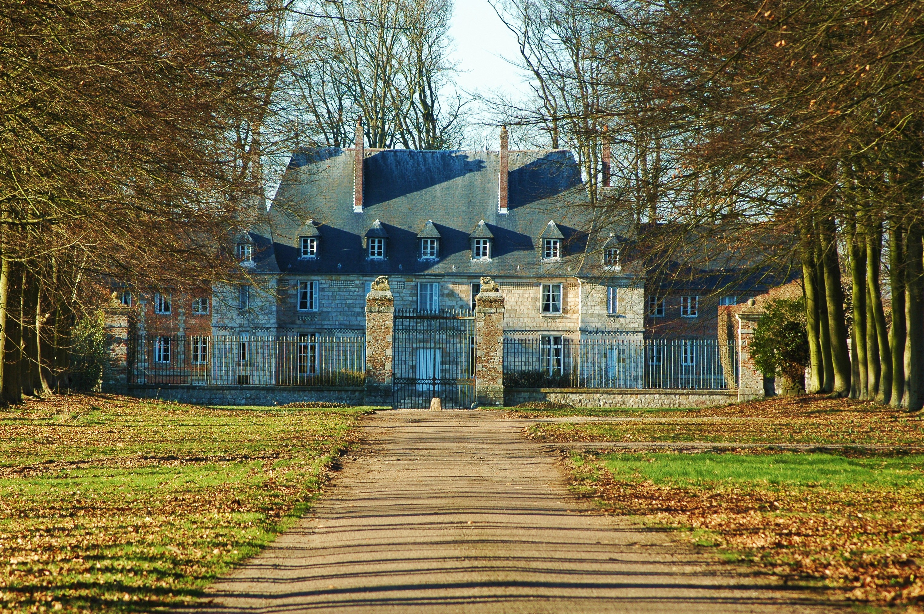 Chateau d'Arnouville